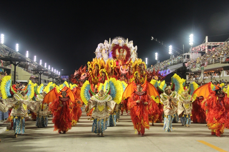 GRES Acadêmicos do Salgueiro, 2012.